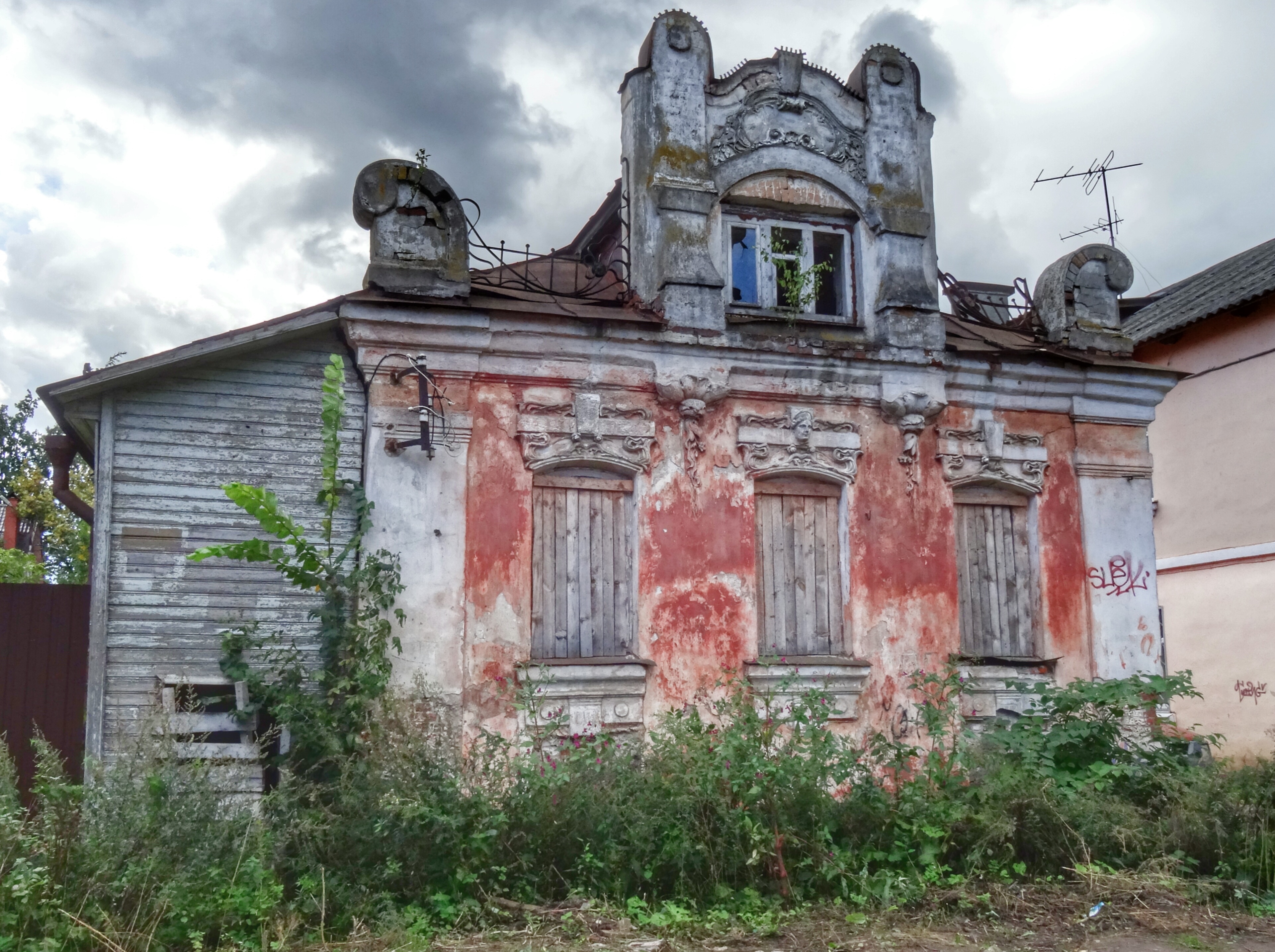 Дом Мутузова: улица Рыбацкая, 44, Тверь, Тверская область